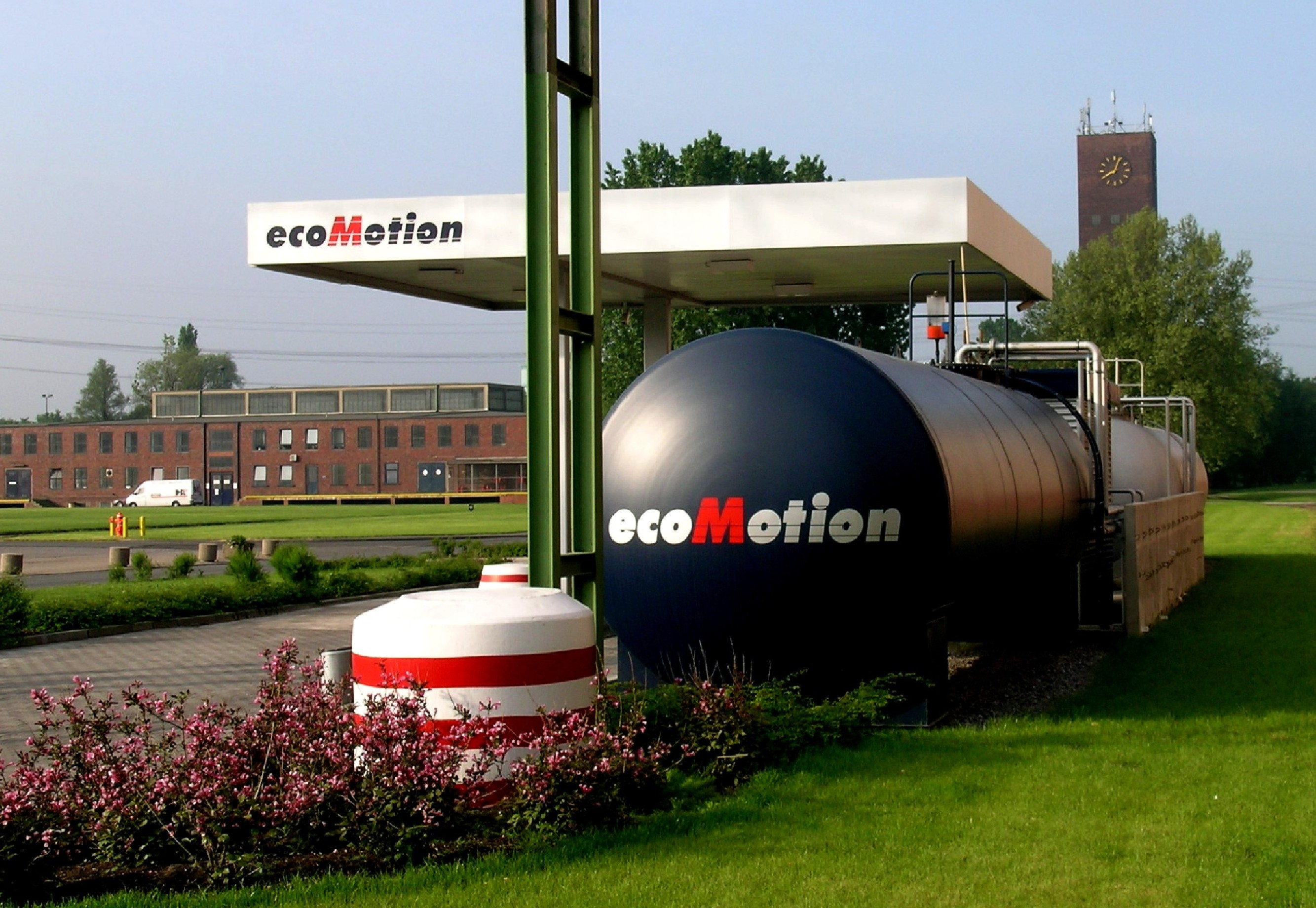 Bio-Diesel-Tankstelle